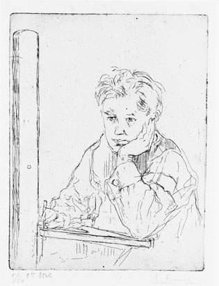 Auguste Brouet, Autoportrait (vers 1920), eau-forte. dimensions : 220 x 168 mm., Pomona College, Claremont (Californie)